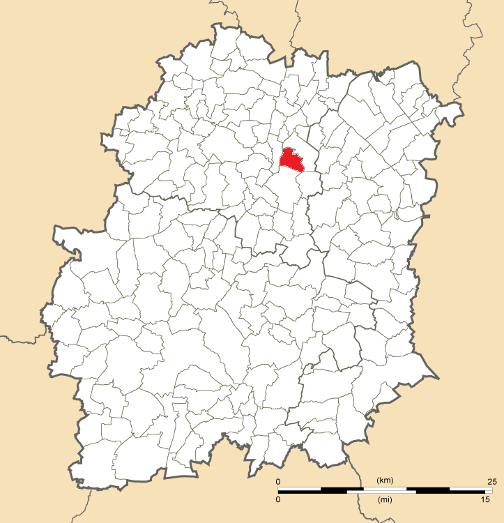 Carte de position de Saint-Michel-sur-Orge en Essonne (91)